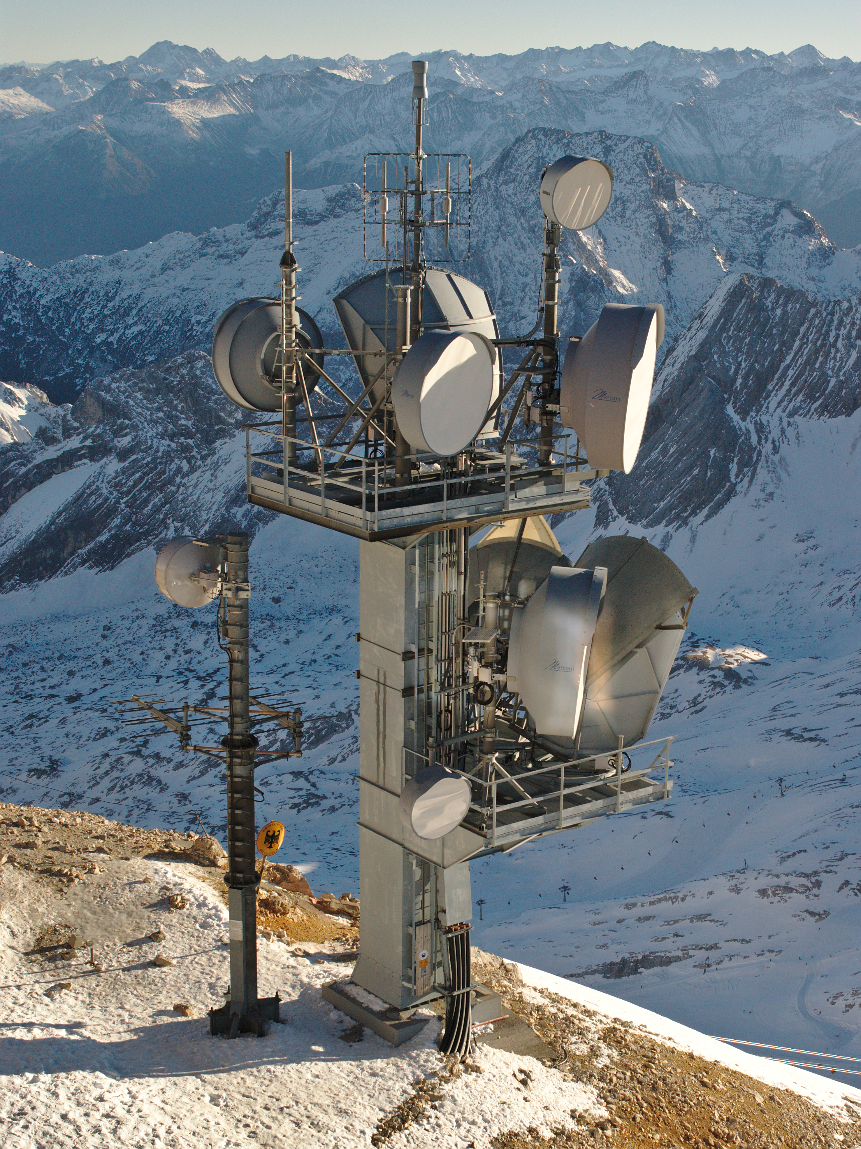 Antennas at Zugspitze summit